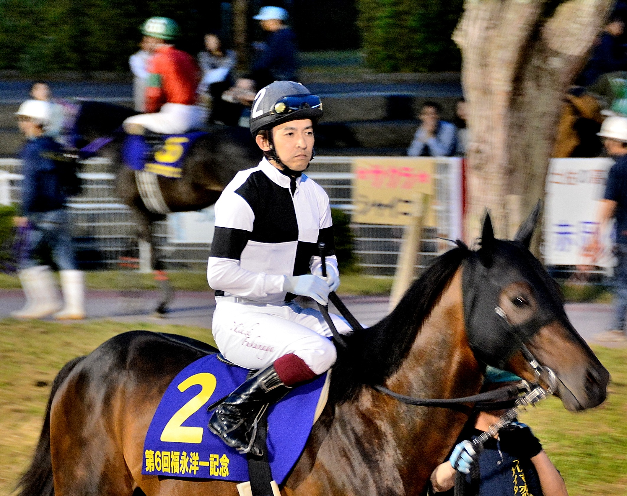 2015年4月29日に高知競馬場の第9競走で行われた「第6回福永洋一記念」のパドックで、2番バーチャルトラックに騎乗している福永祐一騎手を、観客席から撮影。